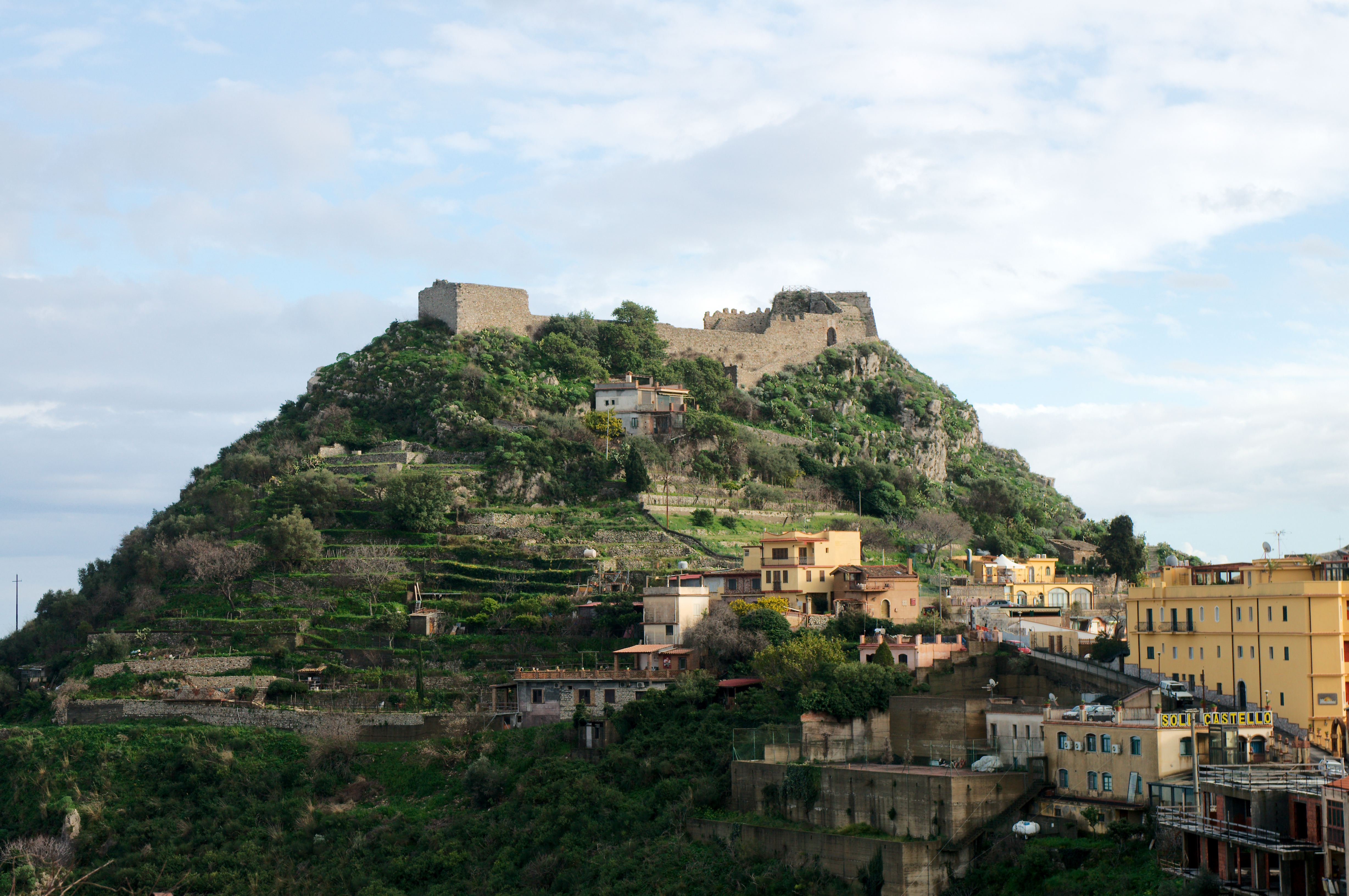 Taormina